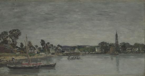 L'Hôpital-Camfrout vers 1870.